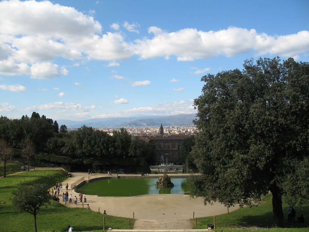 Giardino dei Bobboli